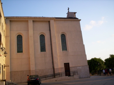 Vista laterale santuario SS. Cosma e Daniamo. Acciarello